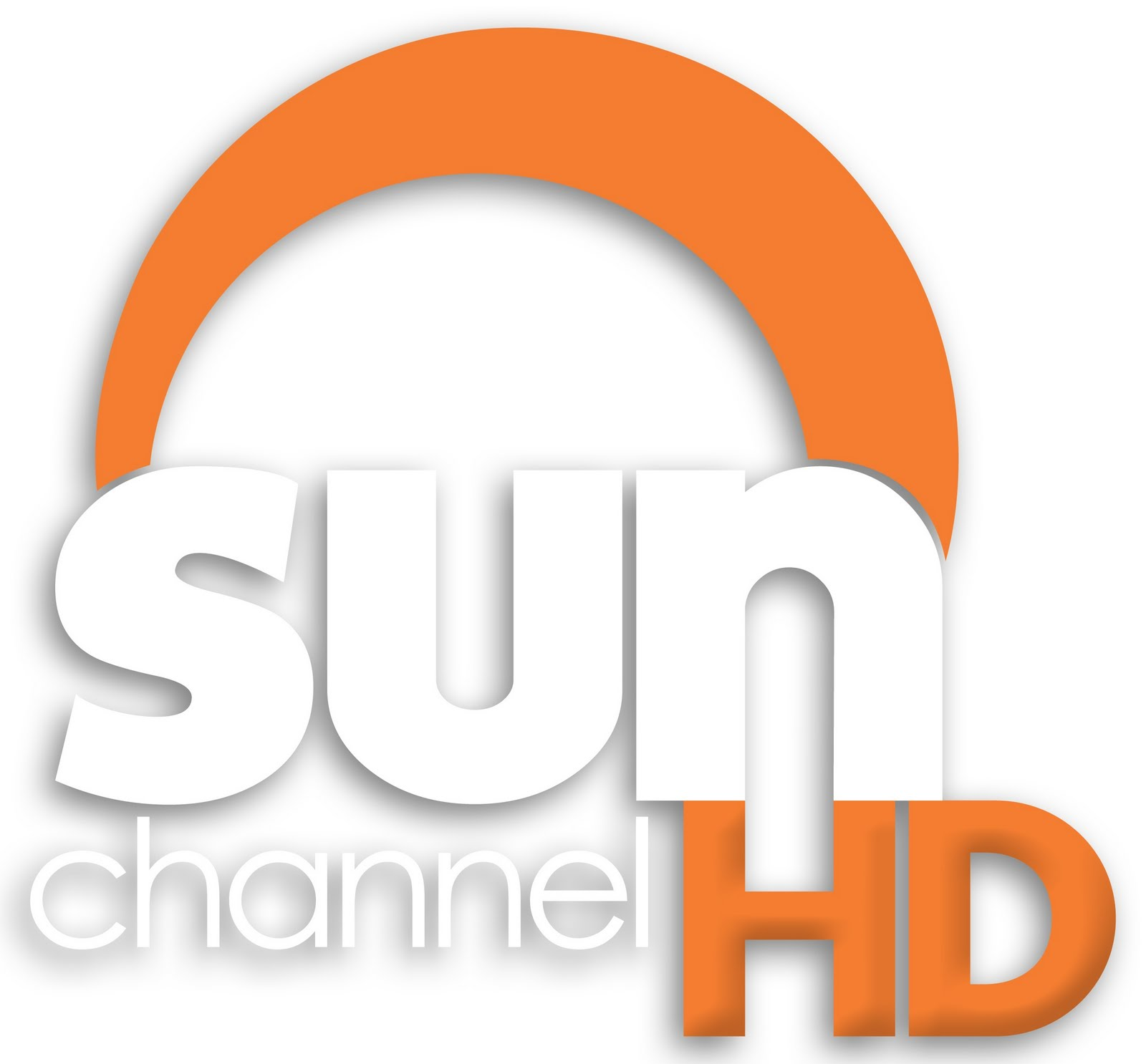 Sun Channel HD es la versión en alta definición del canal venezolano por cable y satélite de Sun.